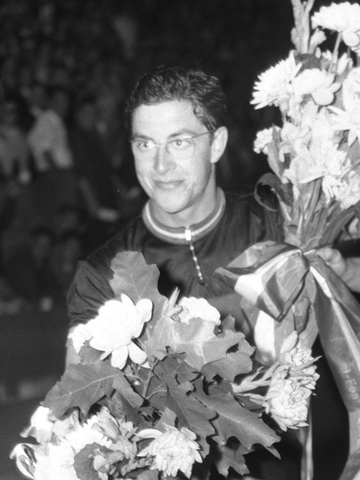 Wereldkampioenschap wielrennen op de baan in Amsterdam. Belg Deconinck